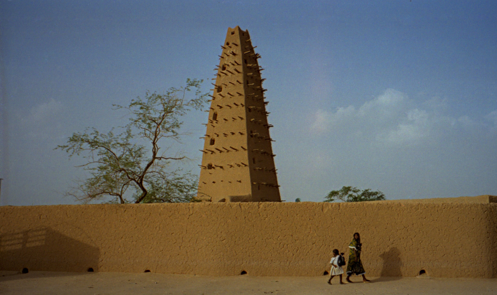 Mosque in Agadez, Niger. Photographed 1997.1997 #277-9A Agadez mosque